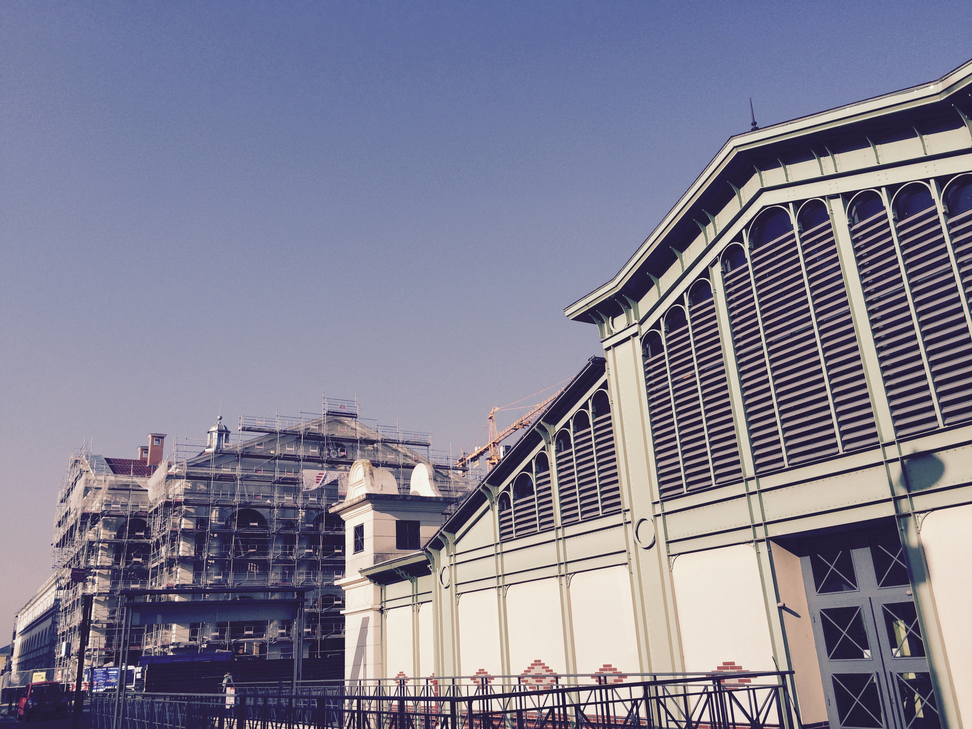 Marché et pôle culturel du Plessis-Robinson, lors de sa construction